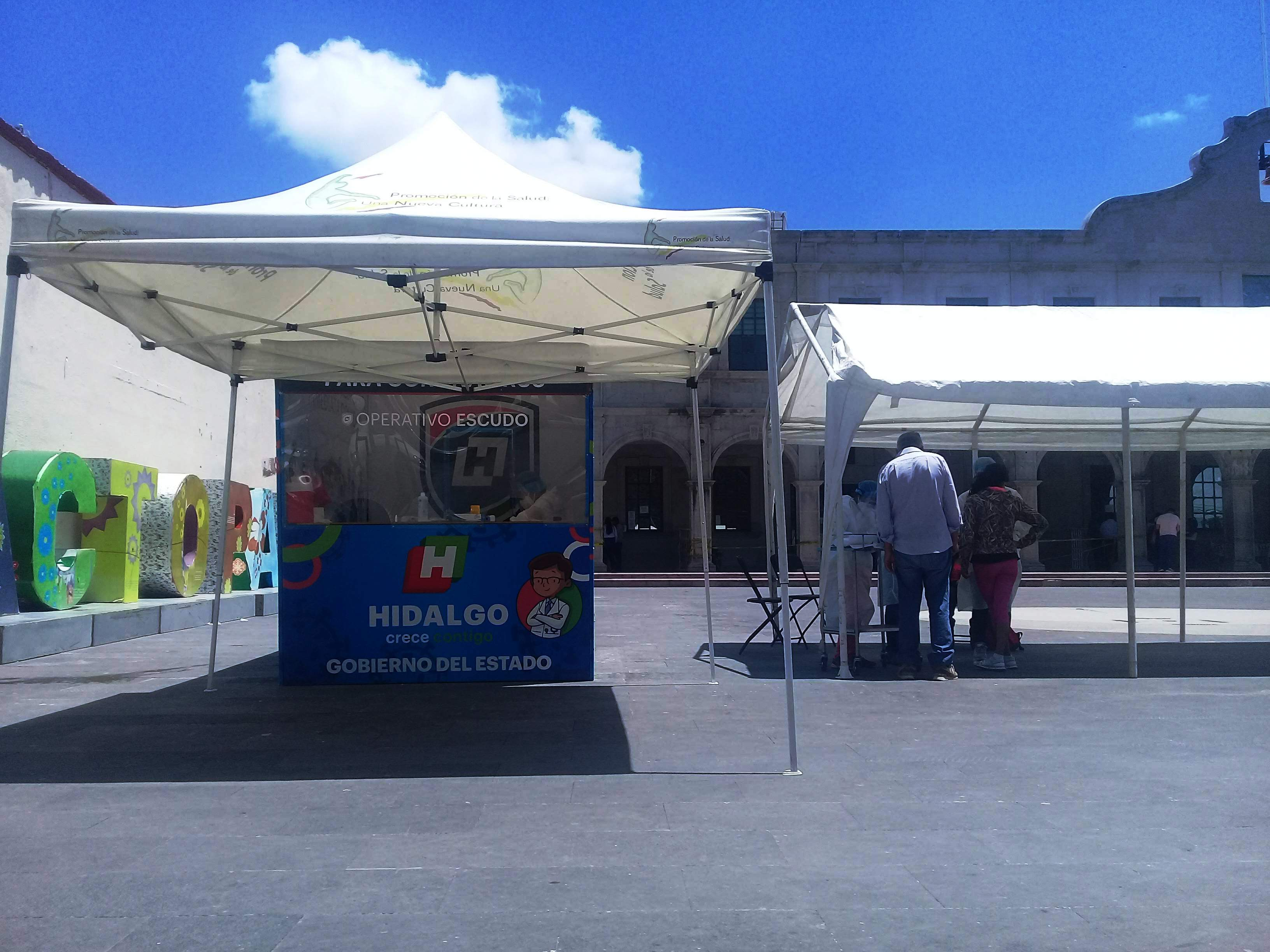 Módulo de Pruebas Rápidas Gratuitas de Covid-19 en Actopan, Hidalgo, México